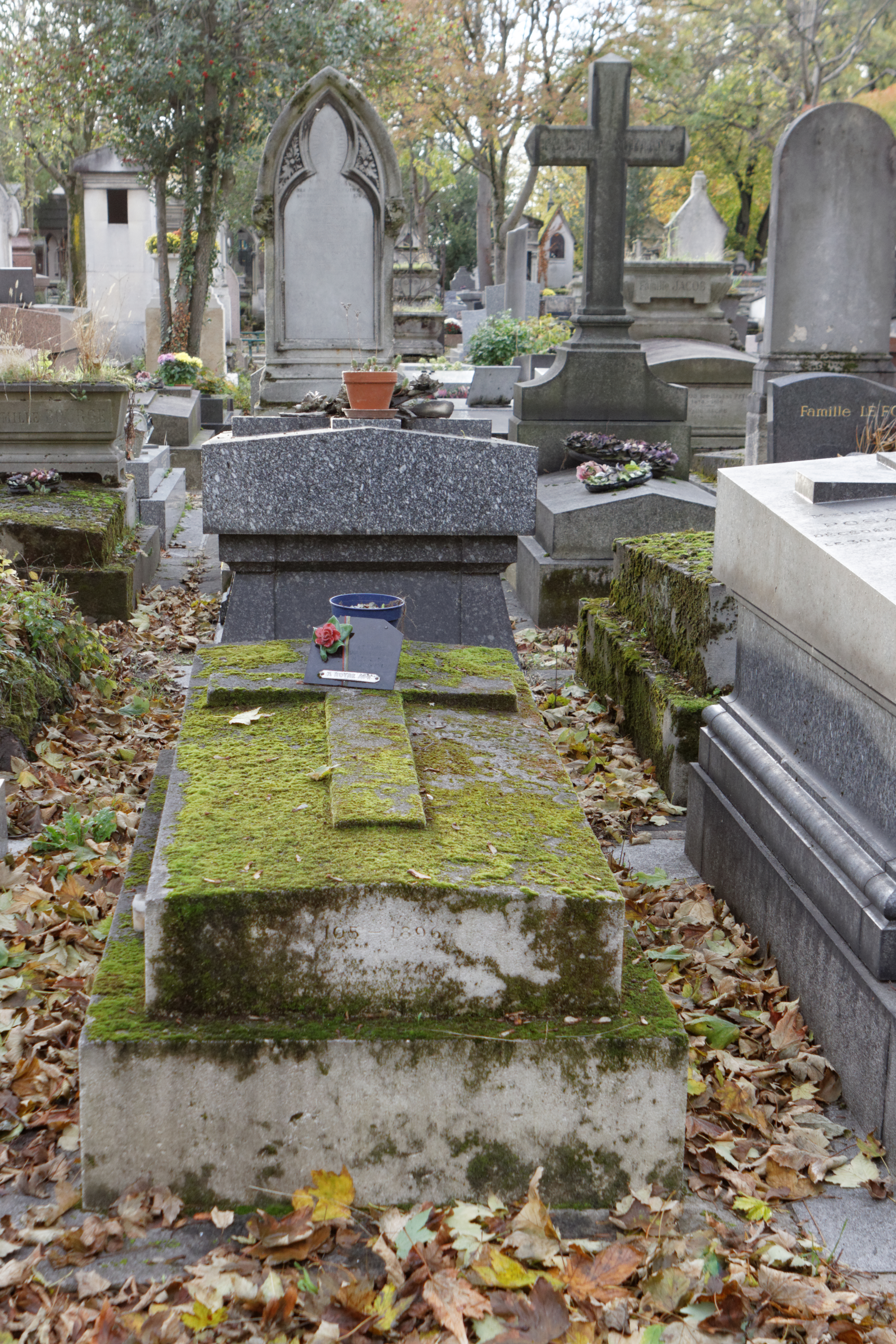 Sépulture de Rufino José Cuervo (1844-1911), linguiste colombien.